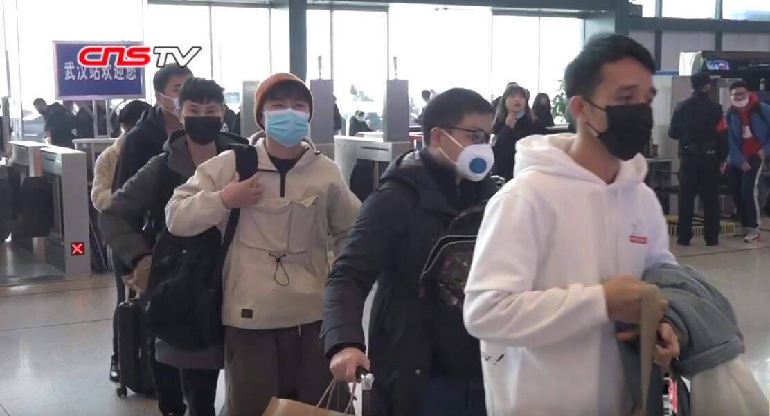 武汉火车站内排队等候体温测量的乘客